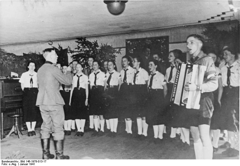 HJ-Rundfunkspielschar aus München bei der Wehrmacht im Frontgebiet. Mit vielem Eifer und großer Begeisterung singen und spielen die Jungens und Mädels für die Soldaten. 11.1.41